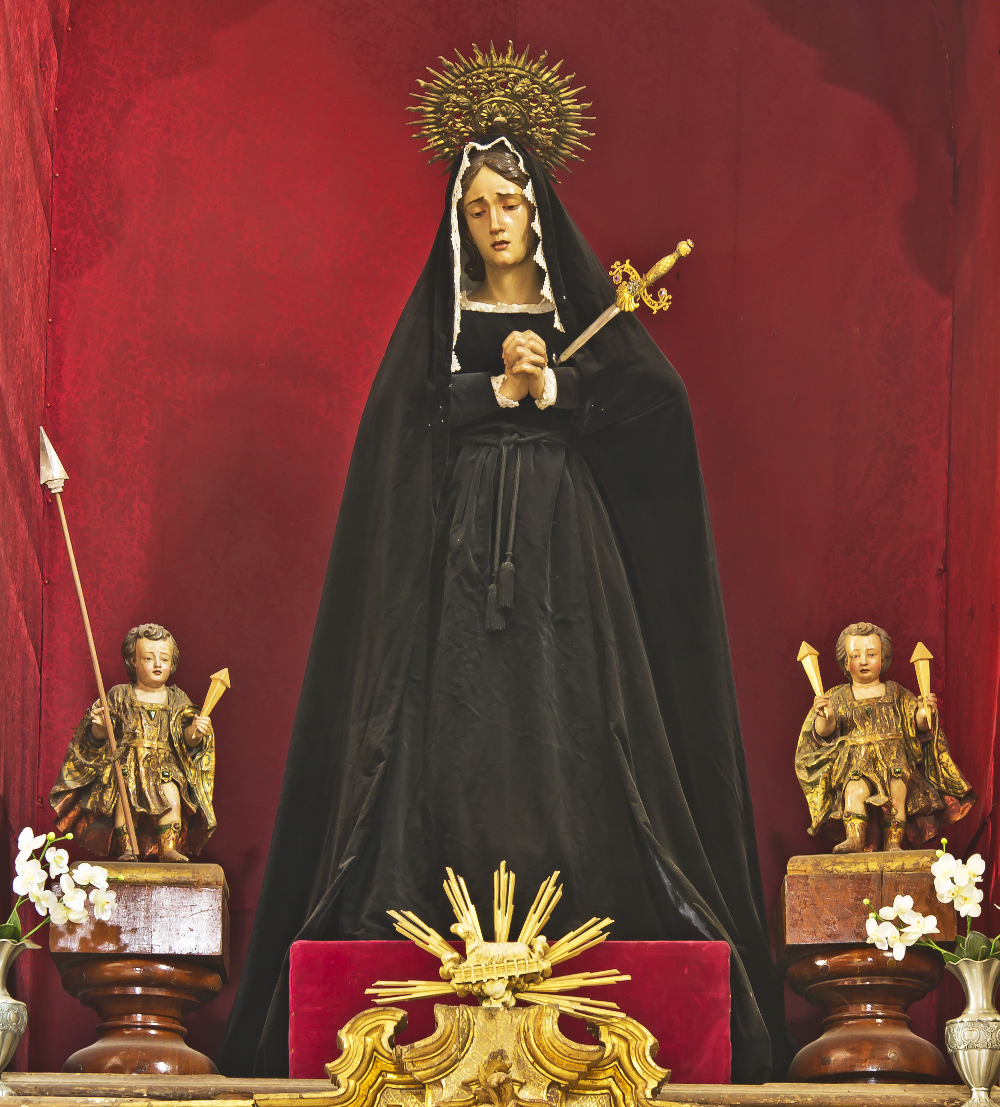 Maria Dolorosa im Altar des rechten inneren Seitenschiffs der Kirche Nuestra Señora de la Concepción, Santa Cruz de Tenerife